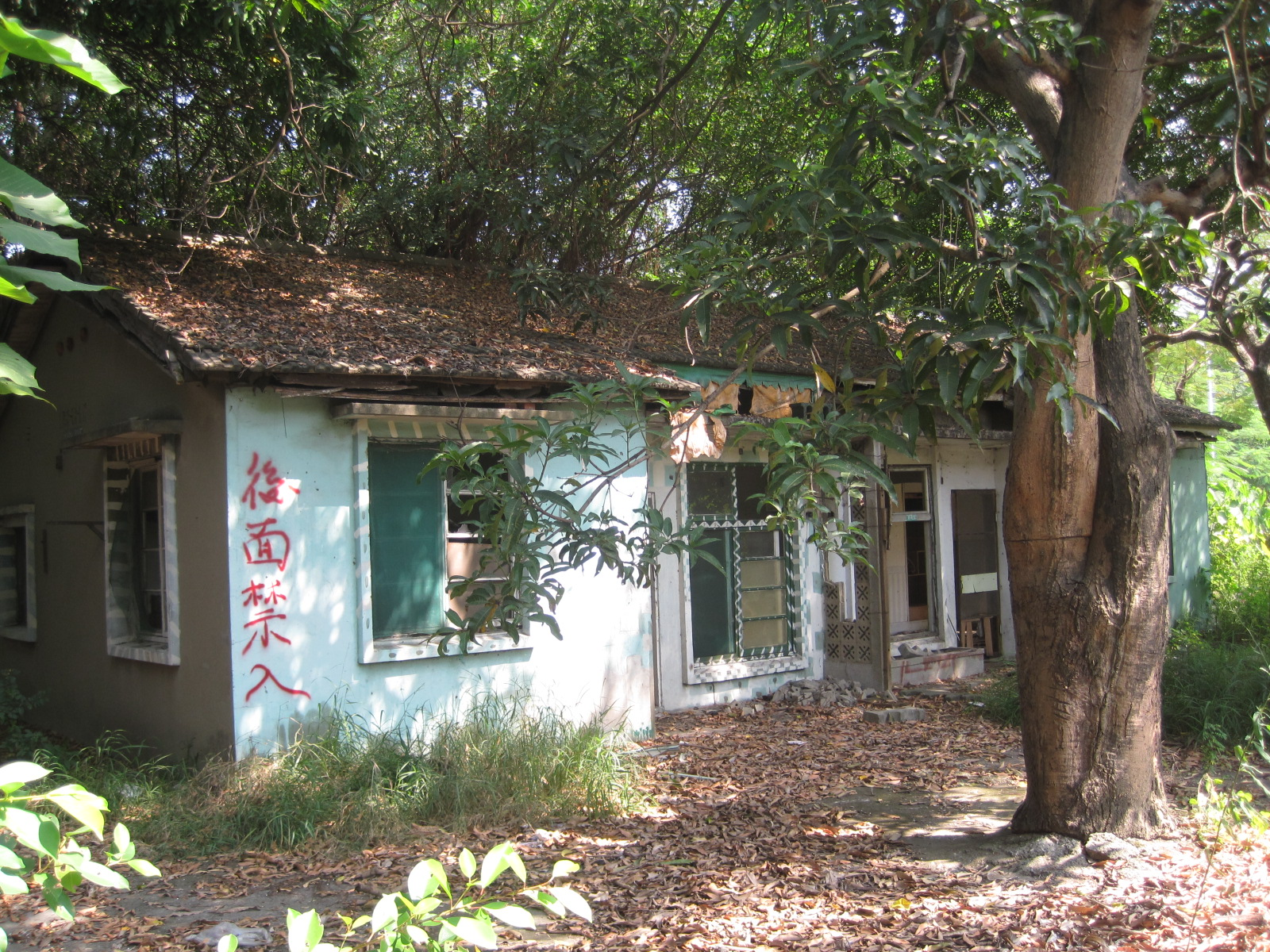 臺灣臺南市永康區飛雁新村的建物。